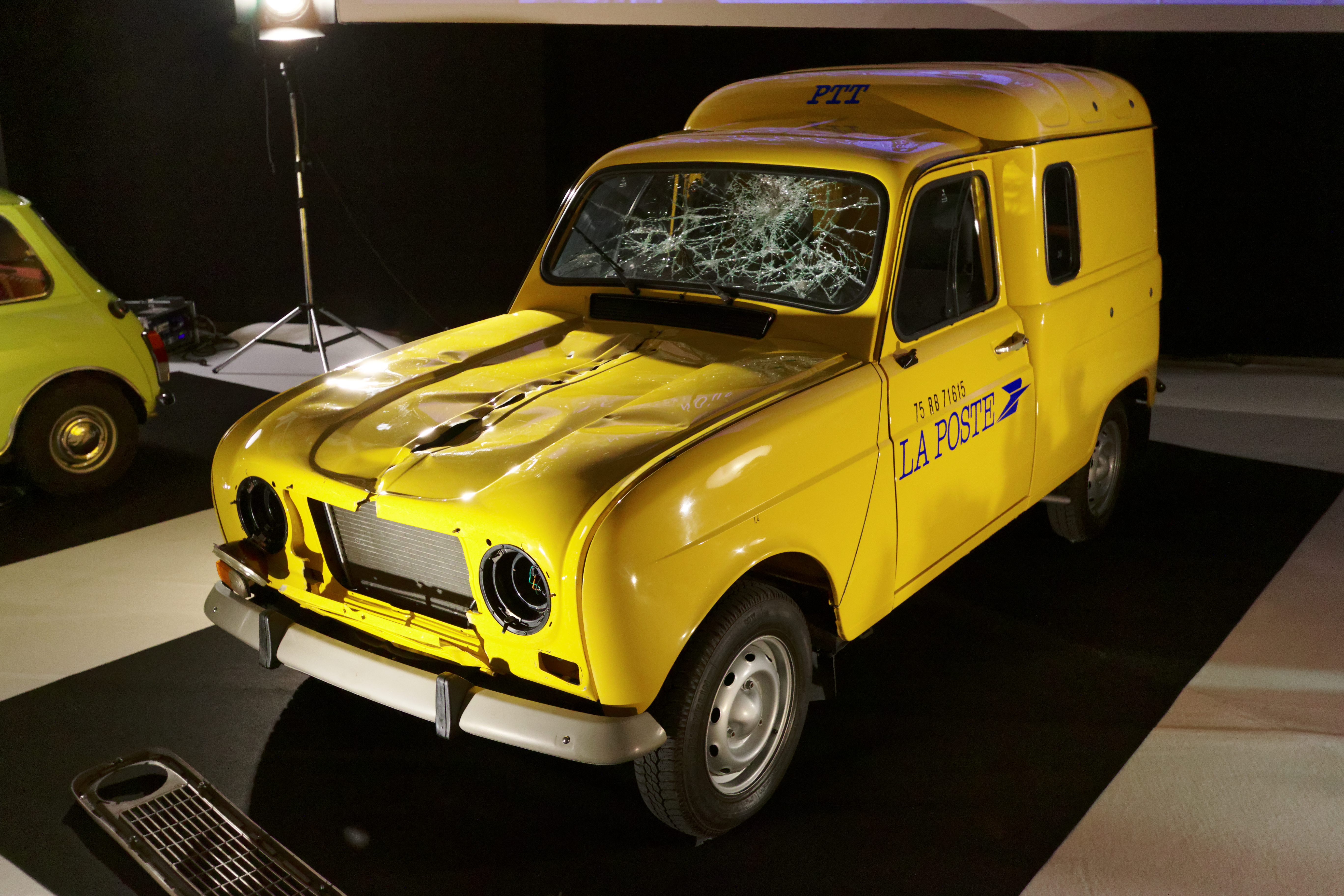 La Renault 4F4 de 1993 utilisée sur le tournage du film Les Visiteurs, ici présentée lors du Mondial de l'automobile de Paris, en 2016, dans l'exposition Moteur ! L'automobile fait son cinéma.